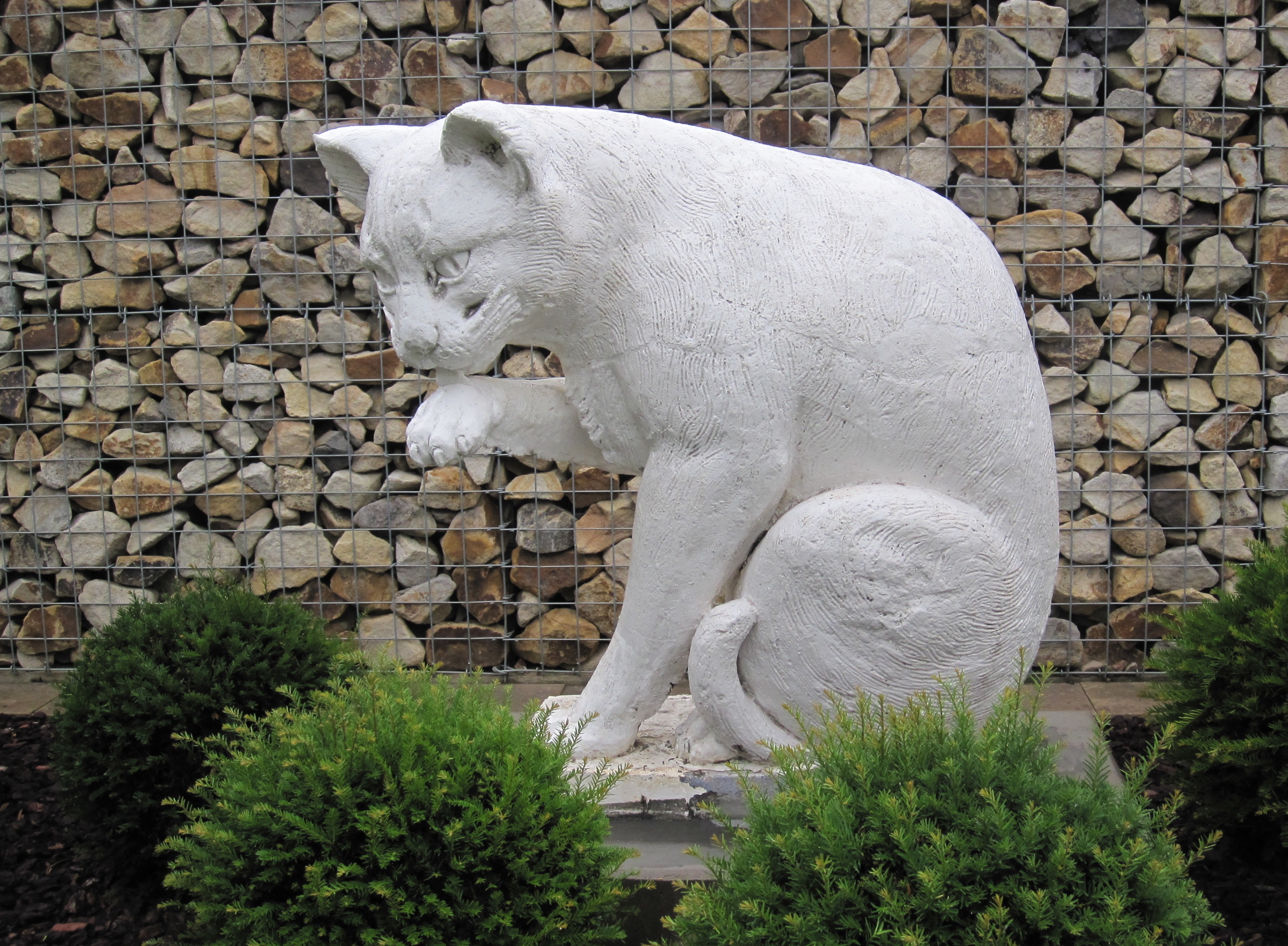 Hoffmanns Katze auf ihrem neuen Standort vor dem ehemaligen Werksgelände